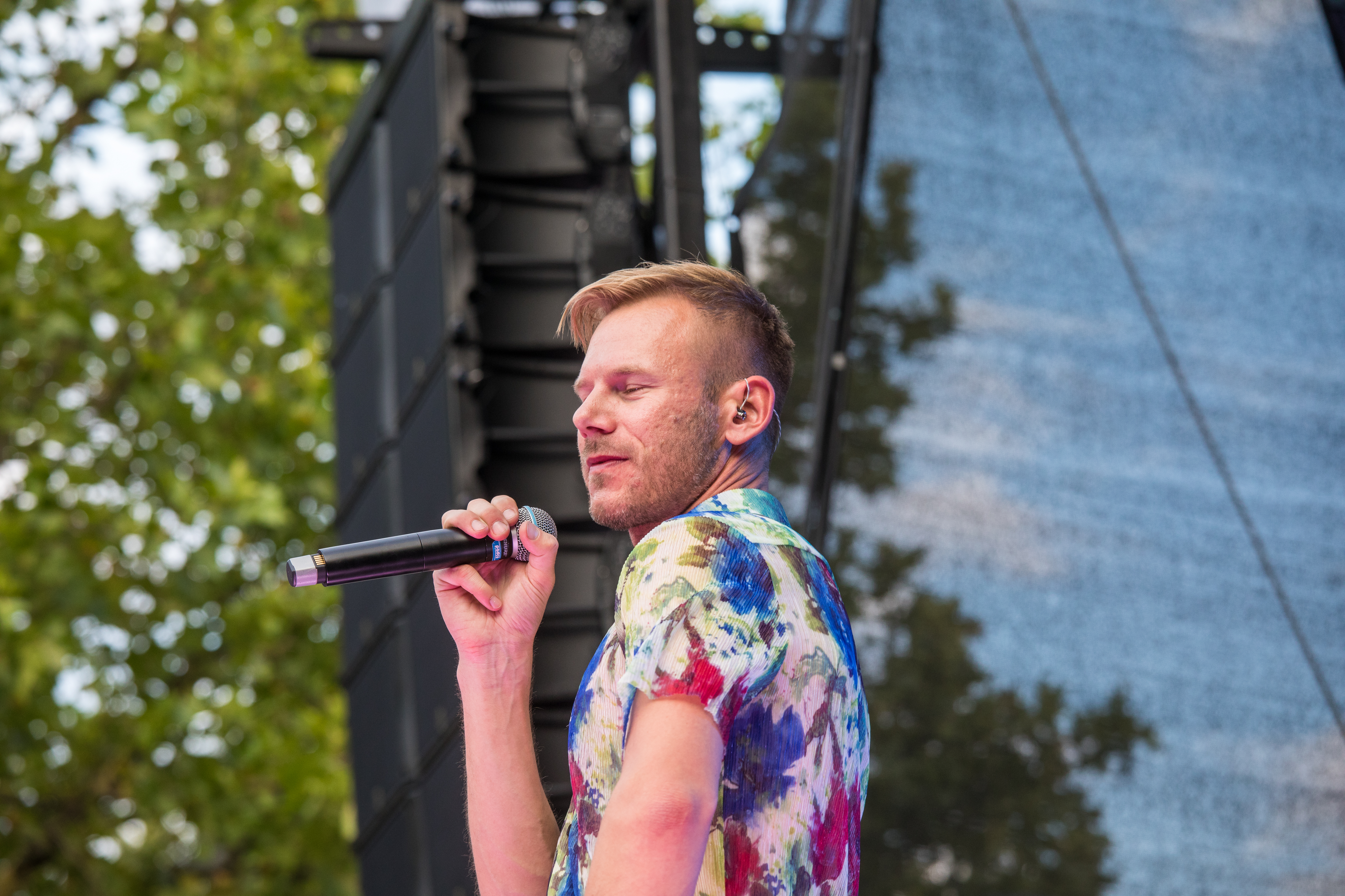 ColognePride/CSD 2018 - Auftritt von Tom Hugo auf der Hauptbühne auf dem Heumarkt